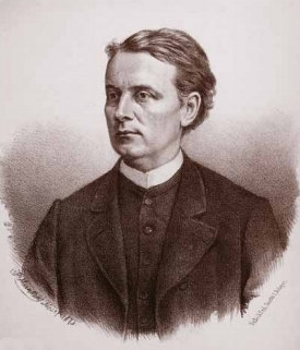 Hatala Péter hittérítő, nyelvész, orientalista, teológiai doktor, egyetemi tanár.